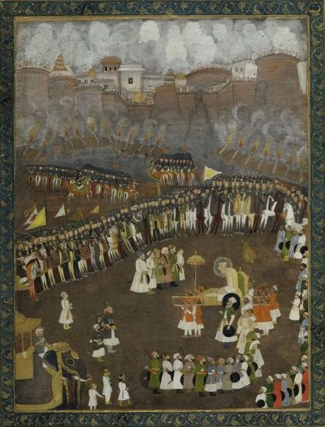 cote cliché RC-A-58971 légende Aurangzeb au siège de Satara département Estampes et photographie cote du document RESERVE OD-44-FOL notice 42154291 exposition 2010 - Miniatures et peintures indiennes partie de Recueil. Batailles et sujets historiques de l'Inde et de Perse folio, pagination Folio 41 catégorie Manuscrits à peinture